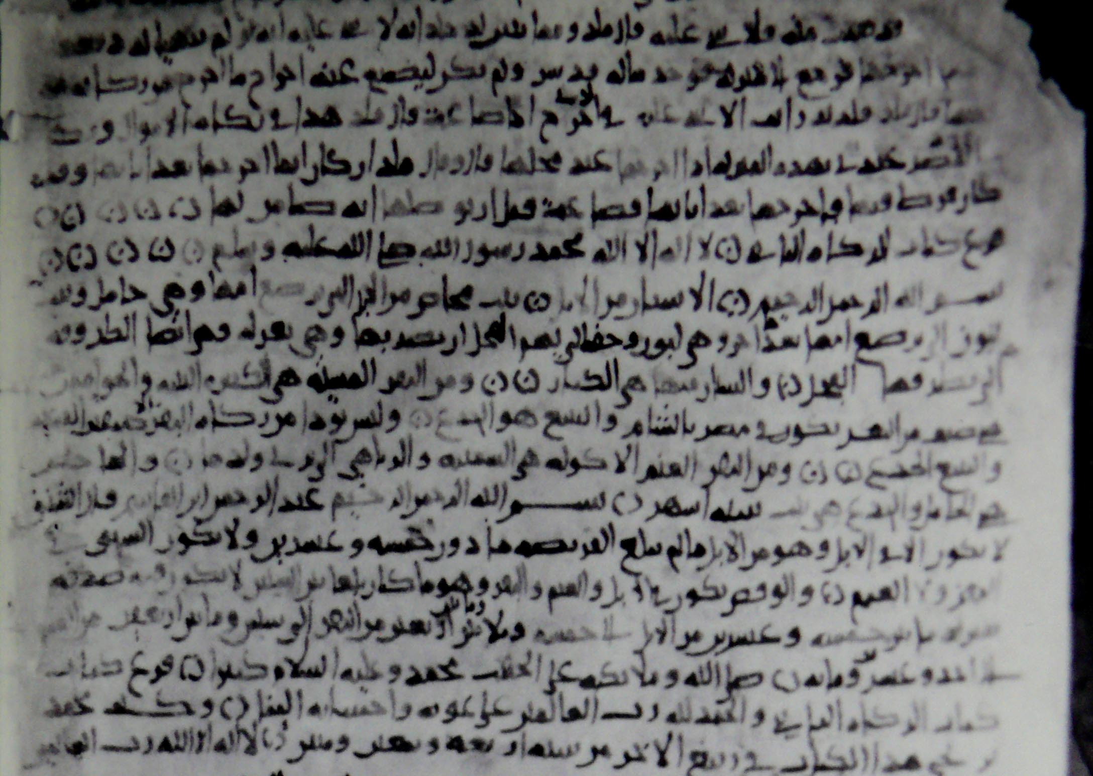 Reproduktion einer arabischen Handschrift aus dem Jahr 909